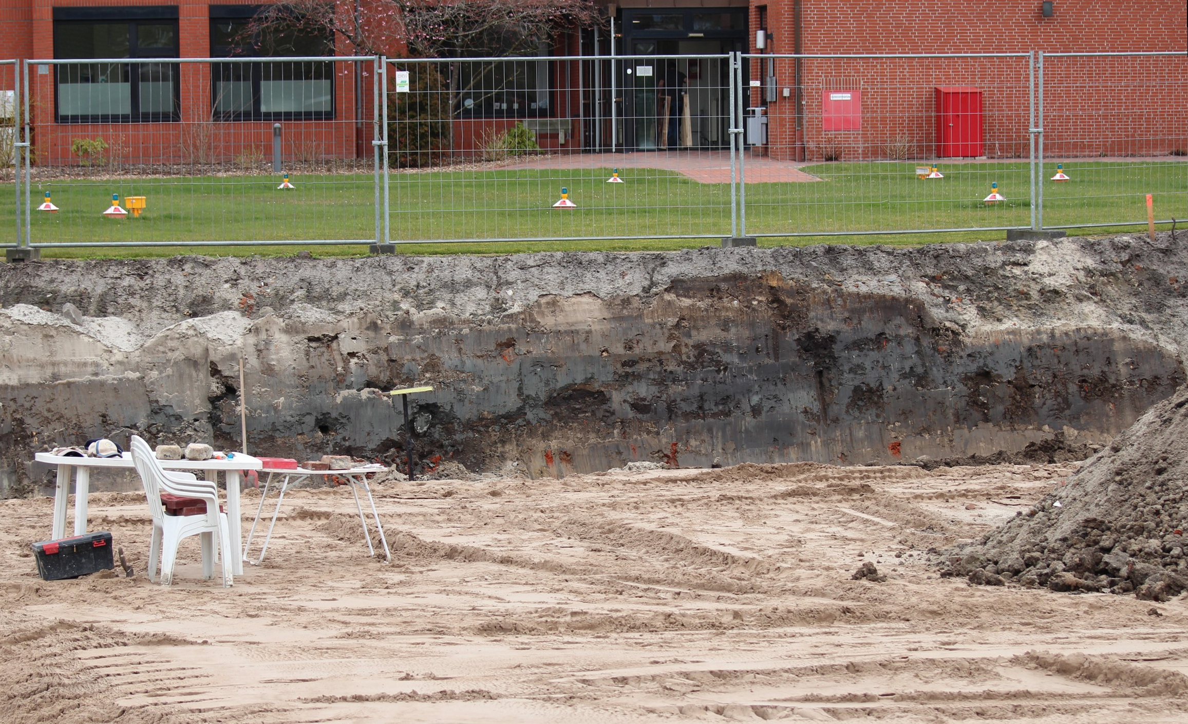 Ausgrabungsgelände der ehemaligen Fockenburg in Leer/Ostfriesland. Grabungsdetail.